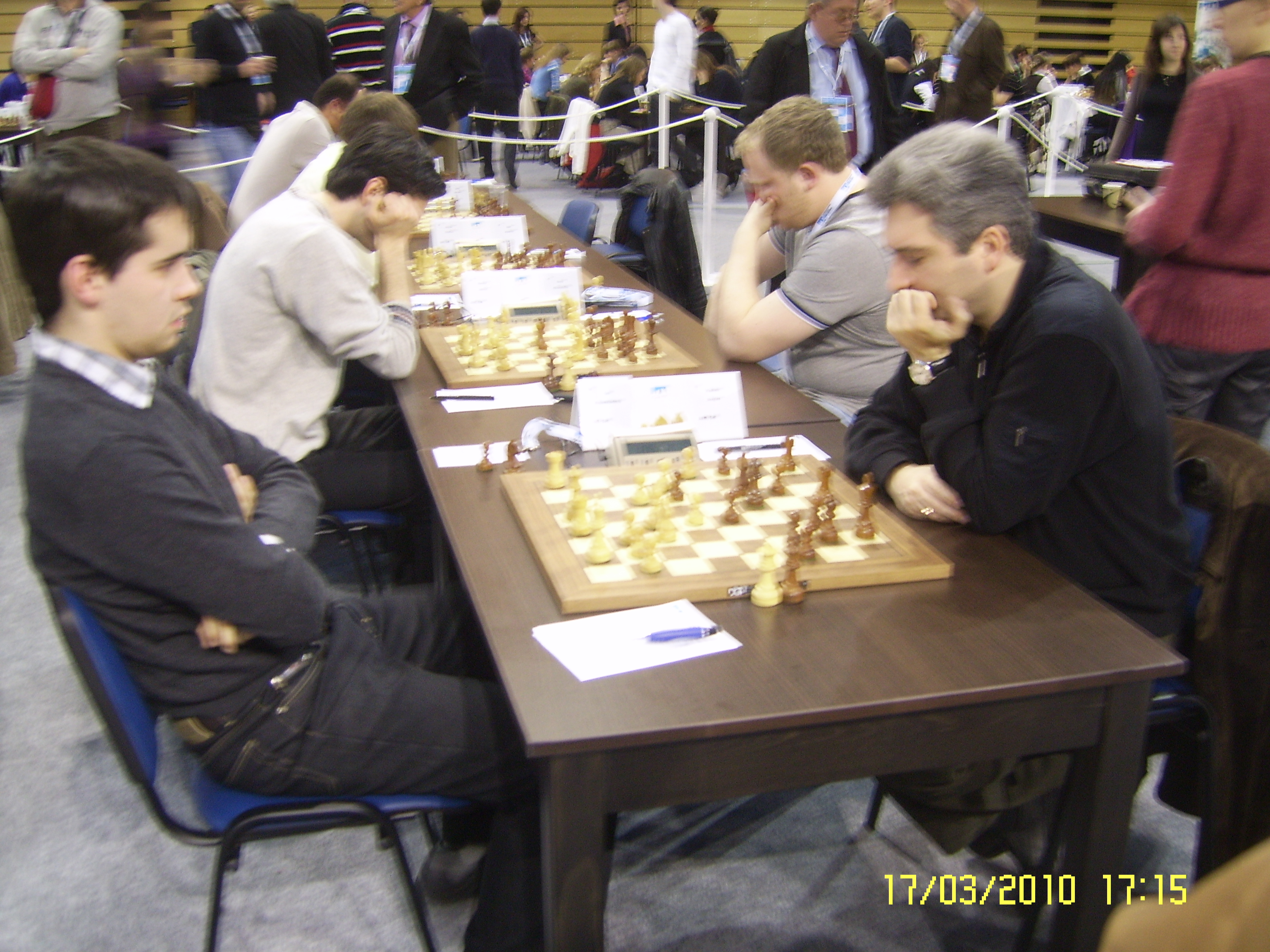 Prvi stol posljednjeg kola na 11. Europskom pojedinačnom prvenstvu u šahu za muškarce i žene 2010. g. u Rijeci: ruski velemajstor Ian Nepomniači (lijevo) protiv armenskog velemajstora Vladimira Akopiana (desno)